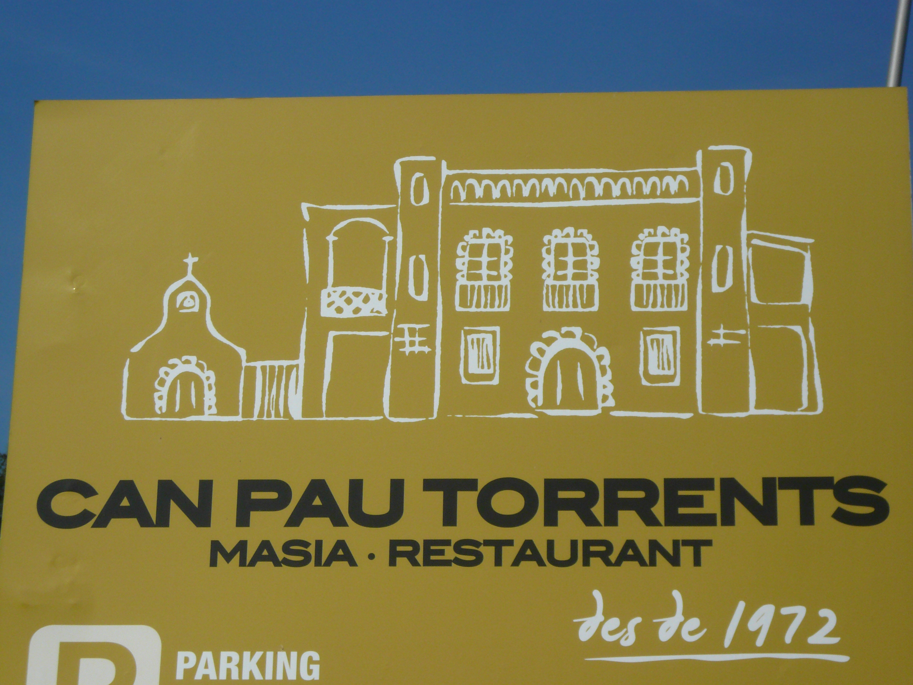 Can Pau Torrents. Camí del Mig, disseminat 7 (Sant Joan Despí). Object location41° 22′ 15.86″ N, 2° 03′ 12.29″ E